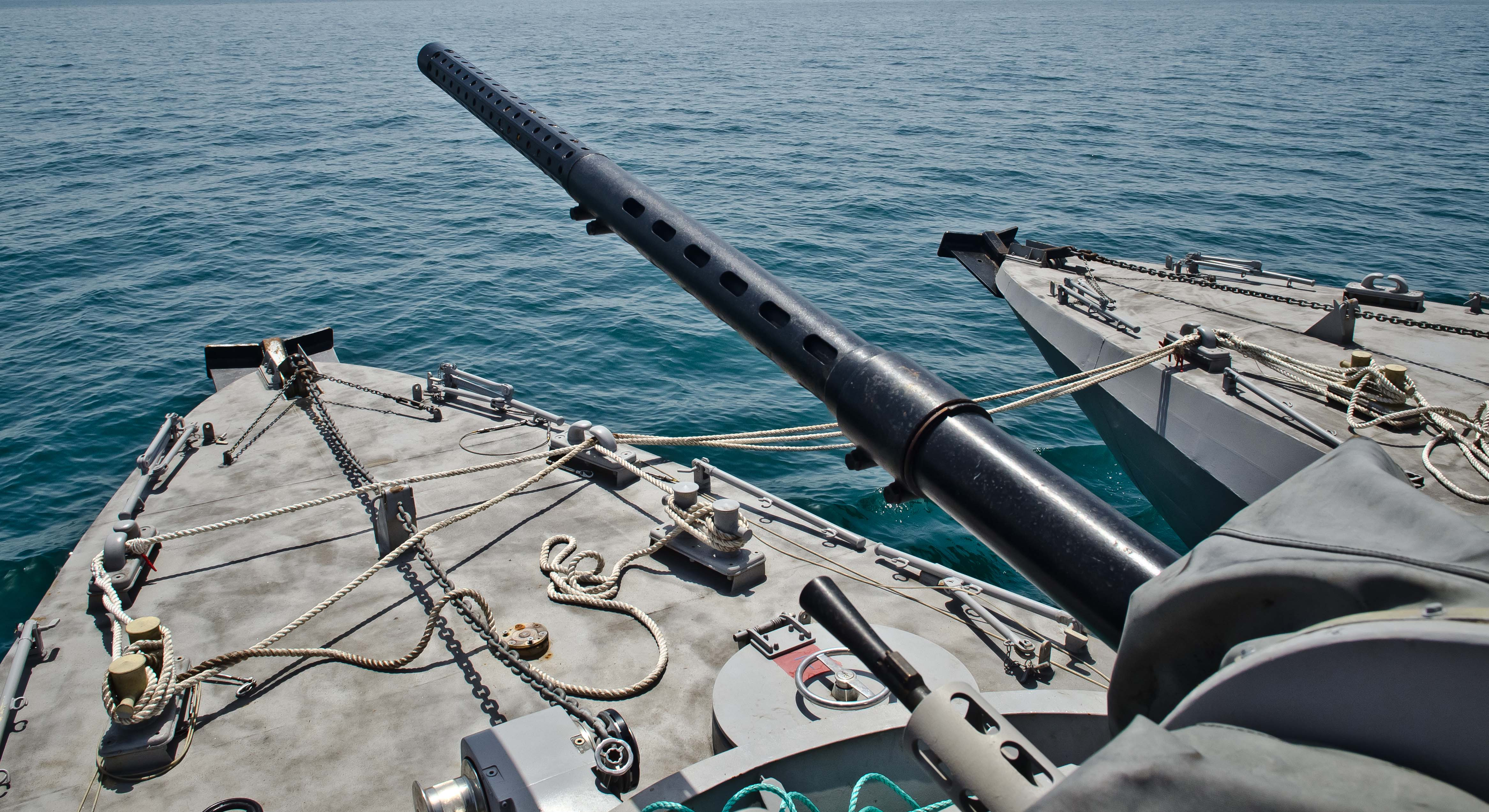 Майбутнє українського флоту - малі броньовані артилерійські катери "Бердянськ" (U-174) та "Аккерман" (U-175) під час ходових випробувань у відритому морі. Два новозбудовані для Військово-Морських Сил Збройних Сил України малі броньовані артилерійські катери в ході випробувань у відкритому морі здійснили спільне плавання. Під час виходу у складі тактичної групи катерів перевірено роботу систем і механізмів у штормових умовах. Матеріальна частина працювала в штатному режимі. Державні іспити та ходові випробування в морі тривають. Фото: Євген Силкін